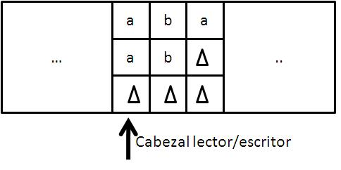 Subdivisión de una celda de la cinta